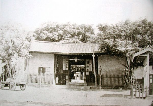 鳳山縣署位於現今的鳳山區縣衙里。